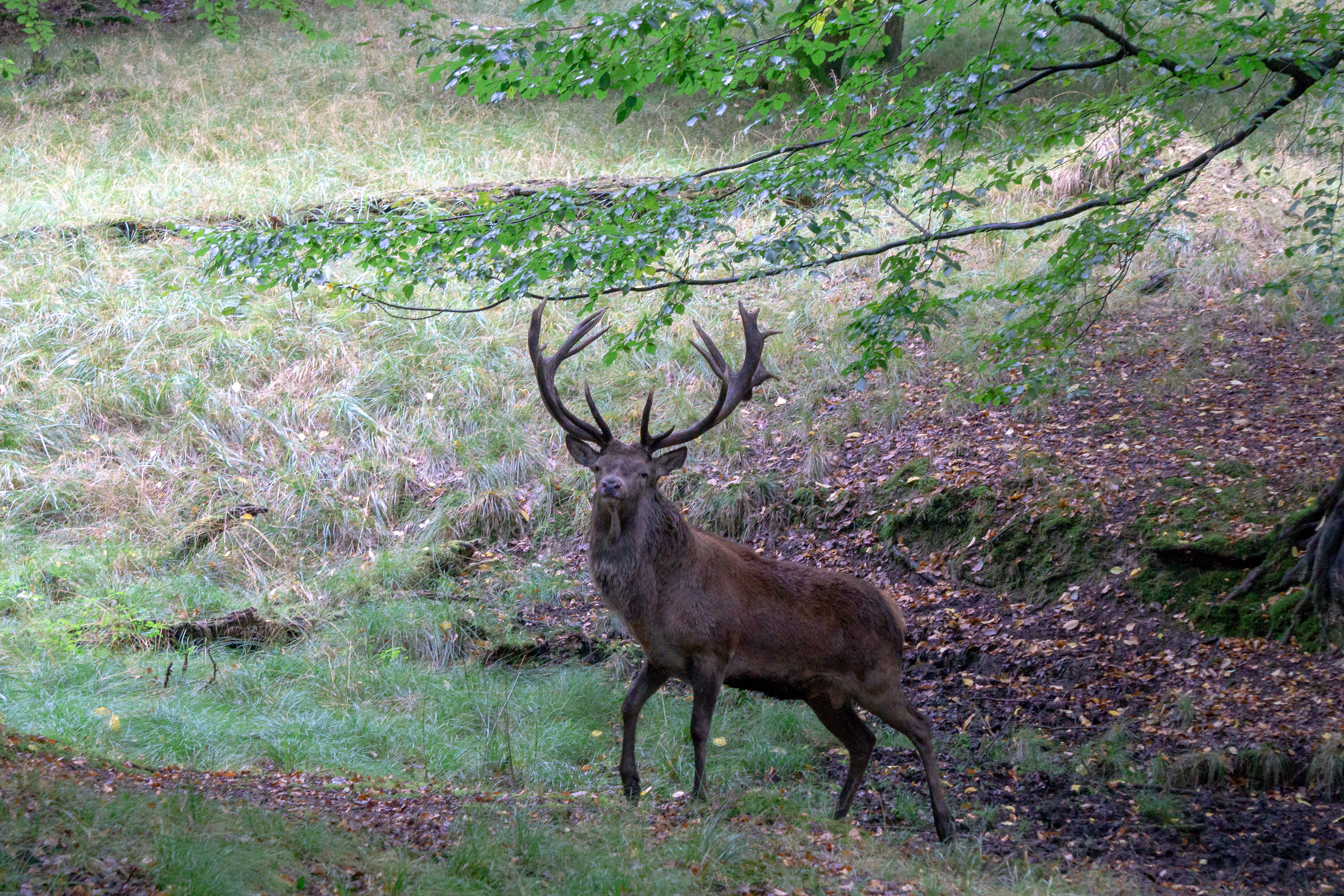 Hirschbrunft im Wildwald Voßwinkel. Teil des FHH Gebiets 4513-301 :Luerwald und Bieberbach und des Naturschutzgebietes HSK-150 Lürwald